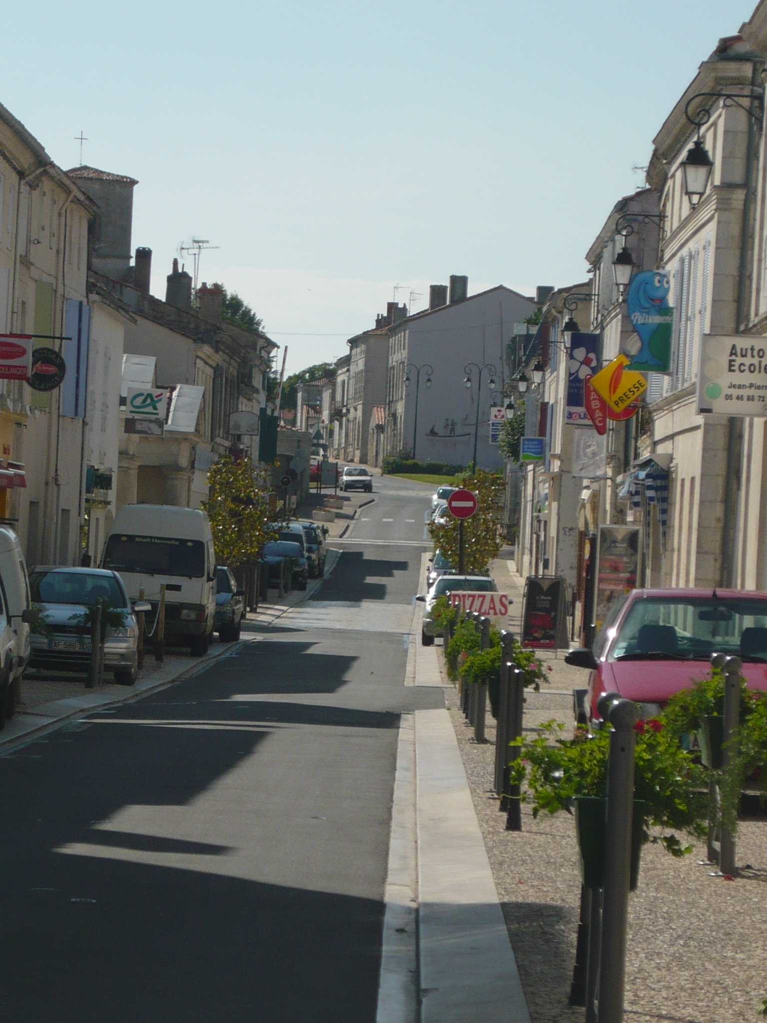 Rue du centre-ville de Tonnay-Charente (17).